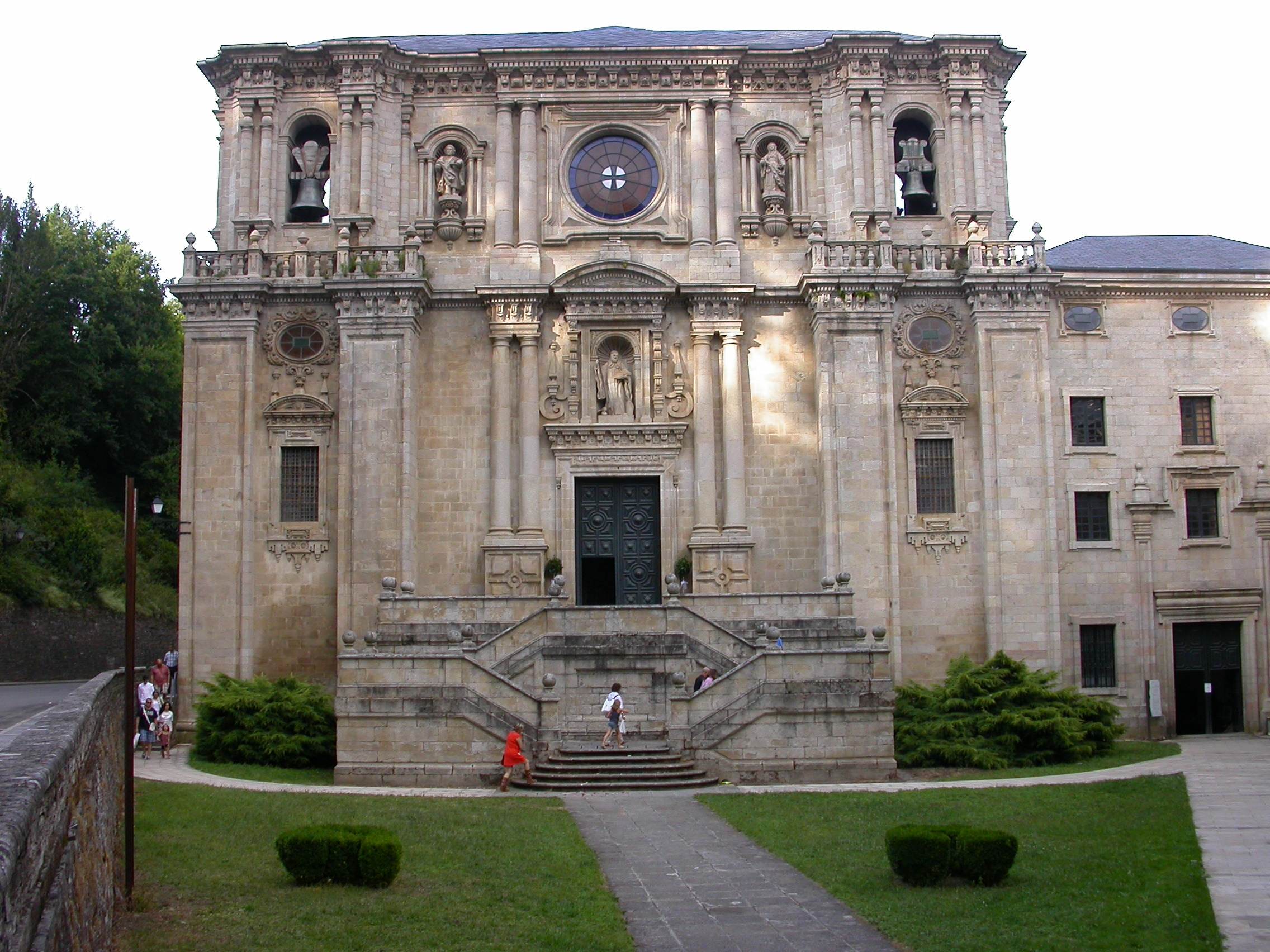 Esta abadía está datada del Siglo VI, época en la que los Suevos poblaban los territorios de lo que hoy conocemos como Galicia.